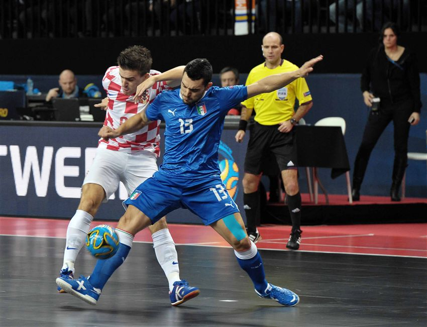 Daniel Giasson, giocatore italiano di calcio a 5, in azione con la maglia dell'italia